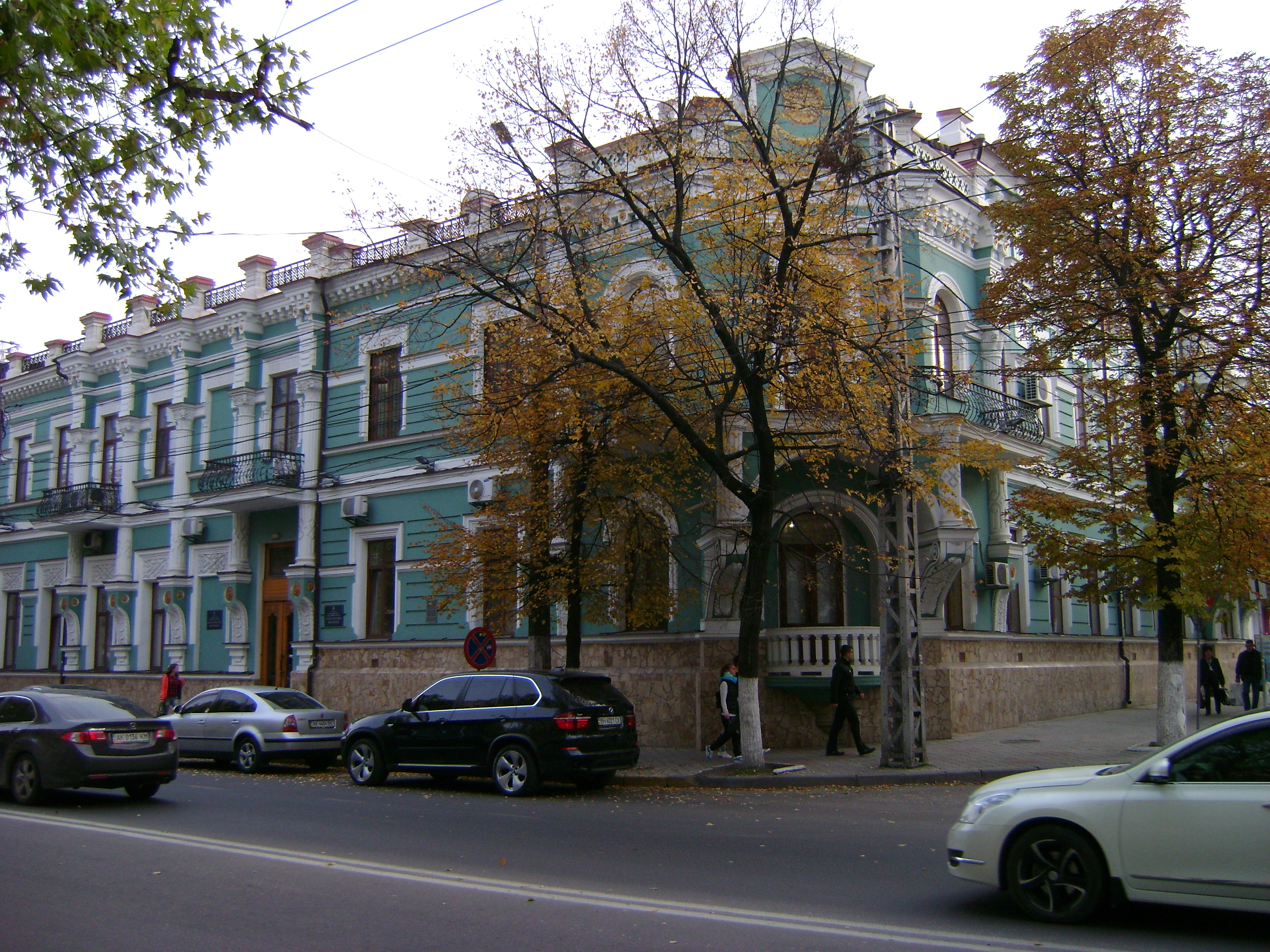 Відділення Азово-Донського комерційного банку, Сімферополь, вул. Олександра Невського, 4/вул. Сєрова, 2, літер «А»